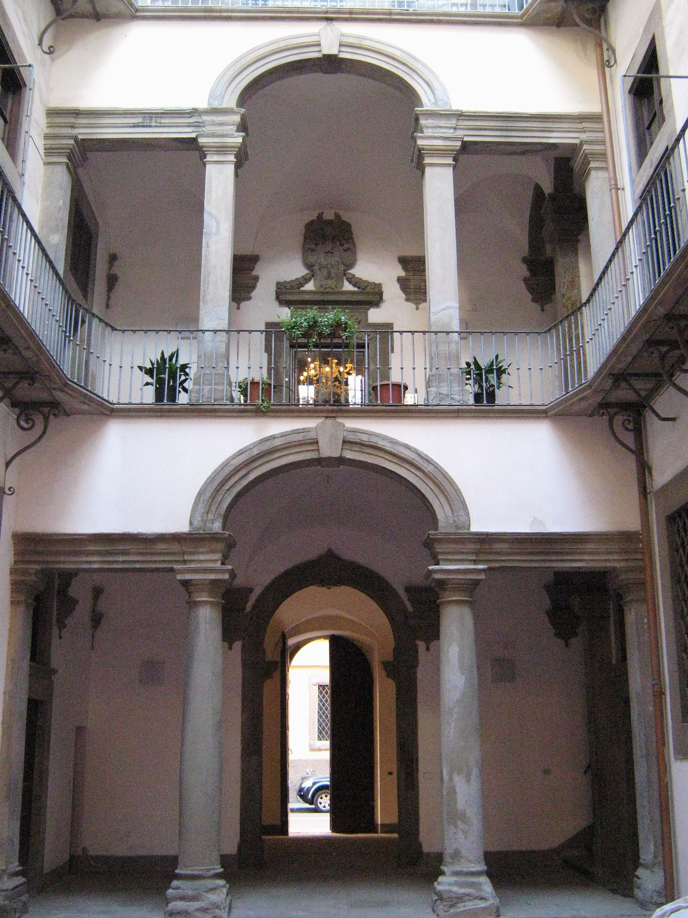 Livorno: la corte interna di Palazzo Huigens, nel cuore della Venezia Nuova